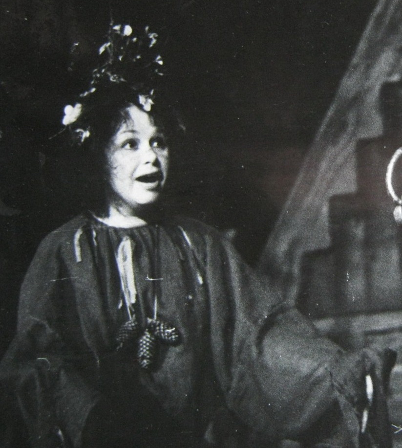 Спектакль Санкт-Петербургского драматического театра «Патриот» РОСТО «Сказ о солдате и Бессмертном Кощее» Татьяна Кудрявцева в роли Кикиморы, Юрий Оськин в роли Солдата, режиссёр-постановщик Егоров Г.С.